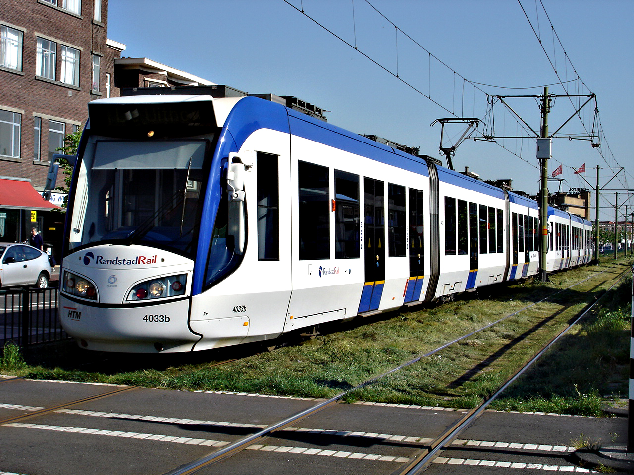 2 RandstadRailvoertuigen op de Apeldoornselaan, Den Haag